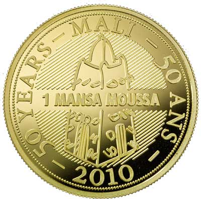 Visuel de la pièce de monnaie "Mansa Moussa".